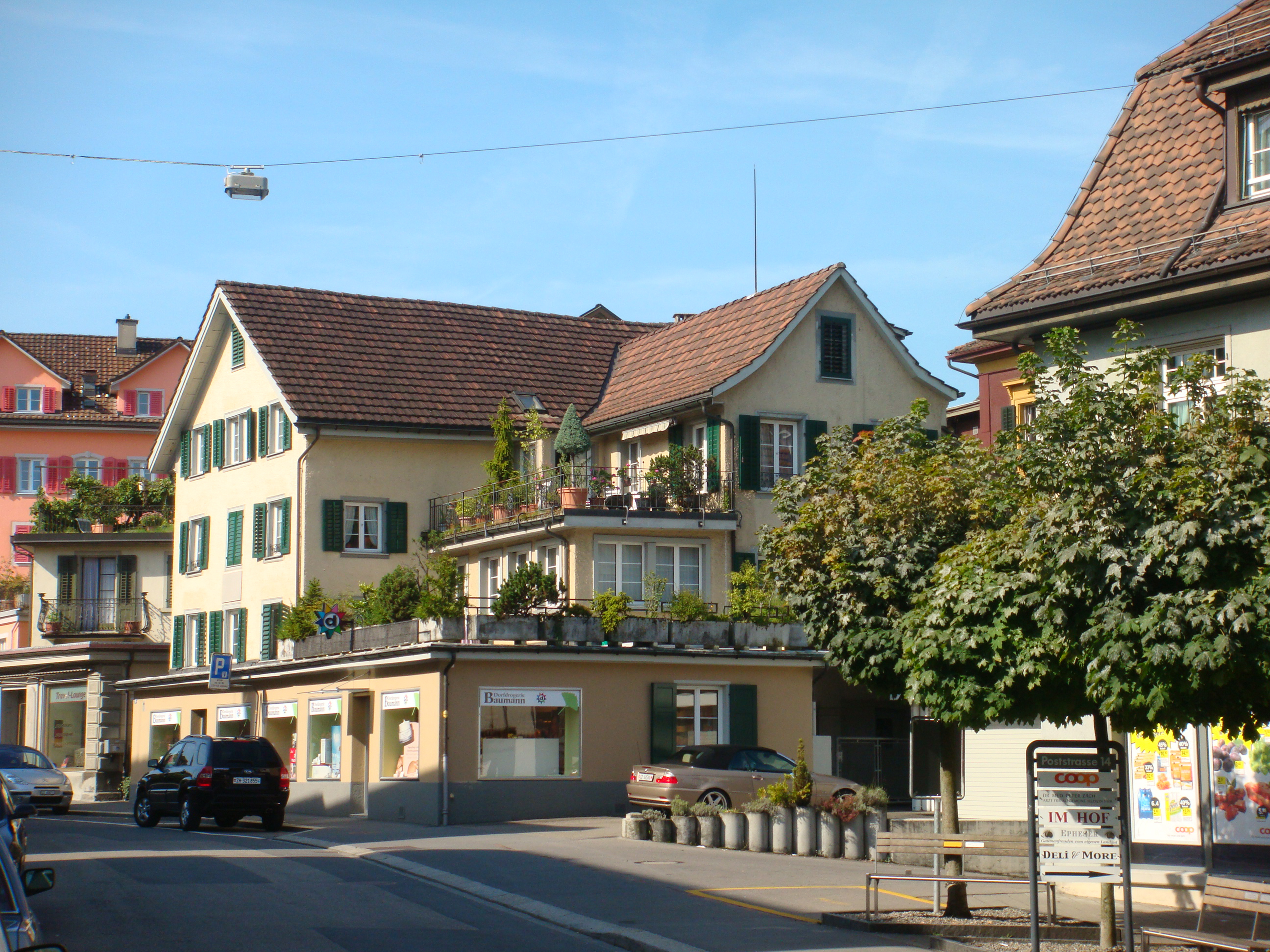 Unteres Hotzehaus oder Diana von 1685 (Poststr. 16) in Richterswil: eines der beiden Häuser von Dr. Johannes Hotze (1734–1801).